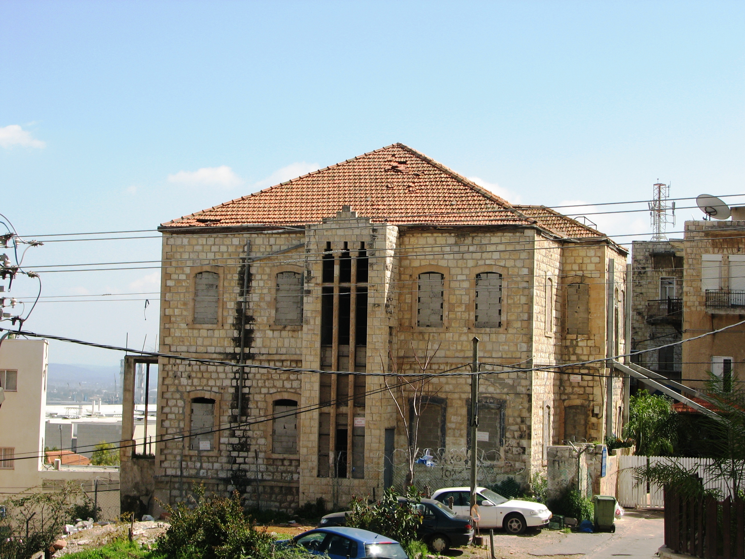 Touma Buildingsת Hadar, Haifa, Israel. the buildings were build by Touma Family, The family of Emil Touma political historian and philosopher בתי תומא הם 4 מבנים בשכונת הדר שלושה ברחוב מעלות נהביאים מס1 17--21, בית המשפחה בו נלד אמיל תומא הוא בסמטת הנביאים 3. הבית הזה מיועד לשימור. במקור נבנו בשכונת הבורג' שעצה היא חלק משכונת הדר בית משפחת תומא נבנה בשנת 1912 בבית זה גר אמיל תומא. הבית מיועד לשימור. מבט לכיוון מזרח